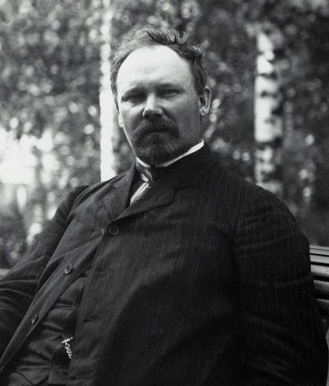 Эемил Сетяля, министр иностранных дел Финляндии